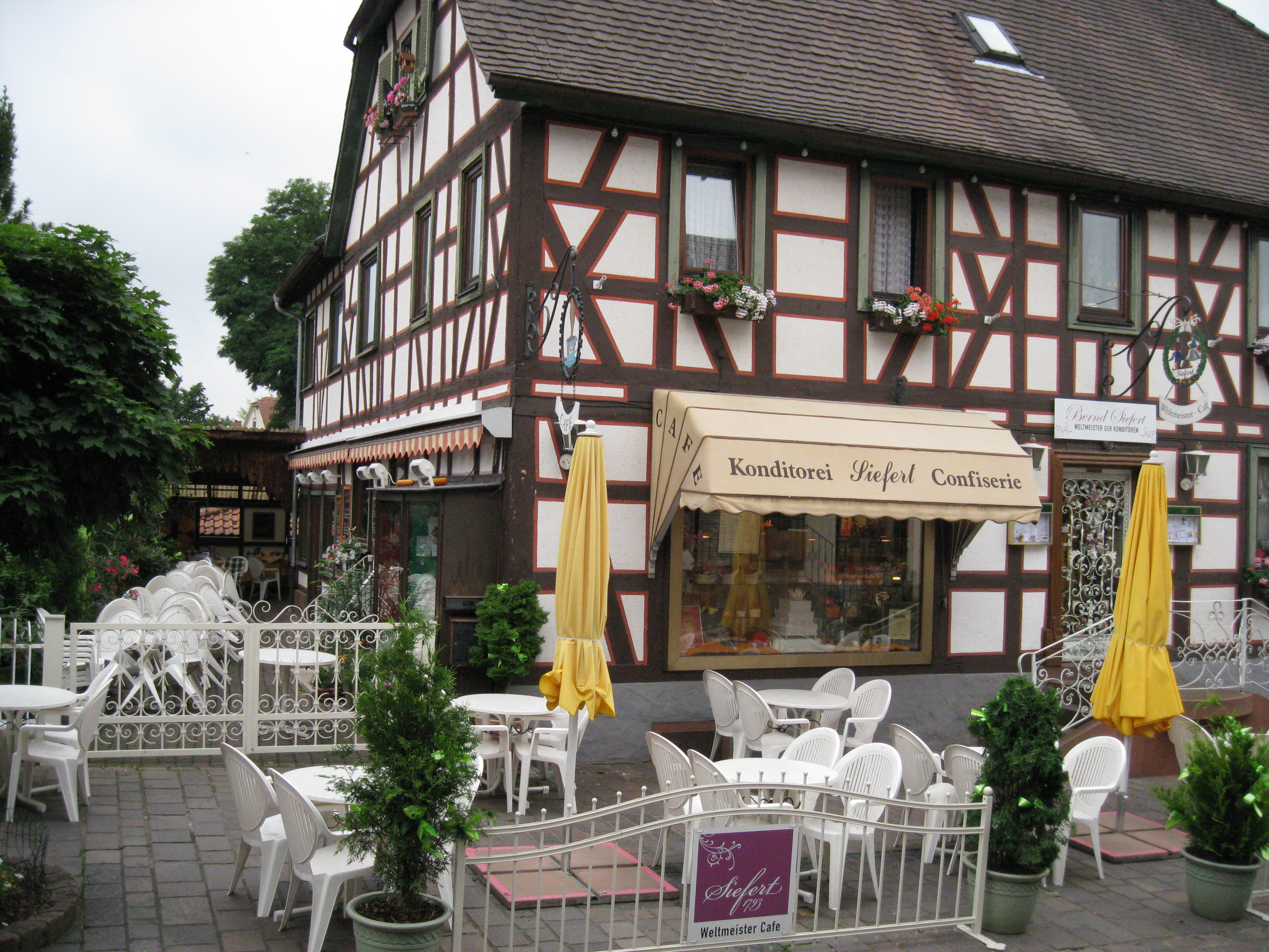 Café Siefert, Michelstadt. Der Mitinhaber Bernd Siefert wurde 1997 "Weltmeister der Konditoren" Café Siefert, Michelstadt